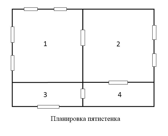 Казачья архитектура. Дом-пятистенок. По материалам ст. Н.С, Попова. Жилище Донских казаков в ареальном аспекте. Вестник ЮНЦ РАН т. 8 №2 2012г.